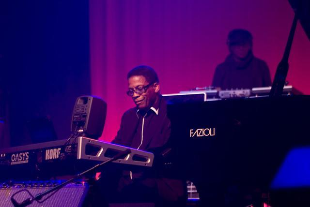 13/4 + (4/4 x 16) = 77/4 Herbie Hancock @ Sonoma Jazz 2008 Korg OASYS